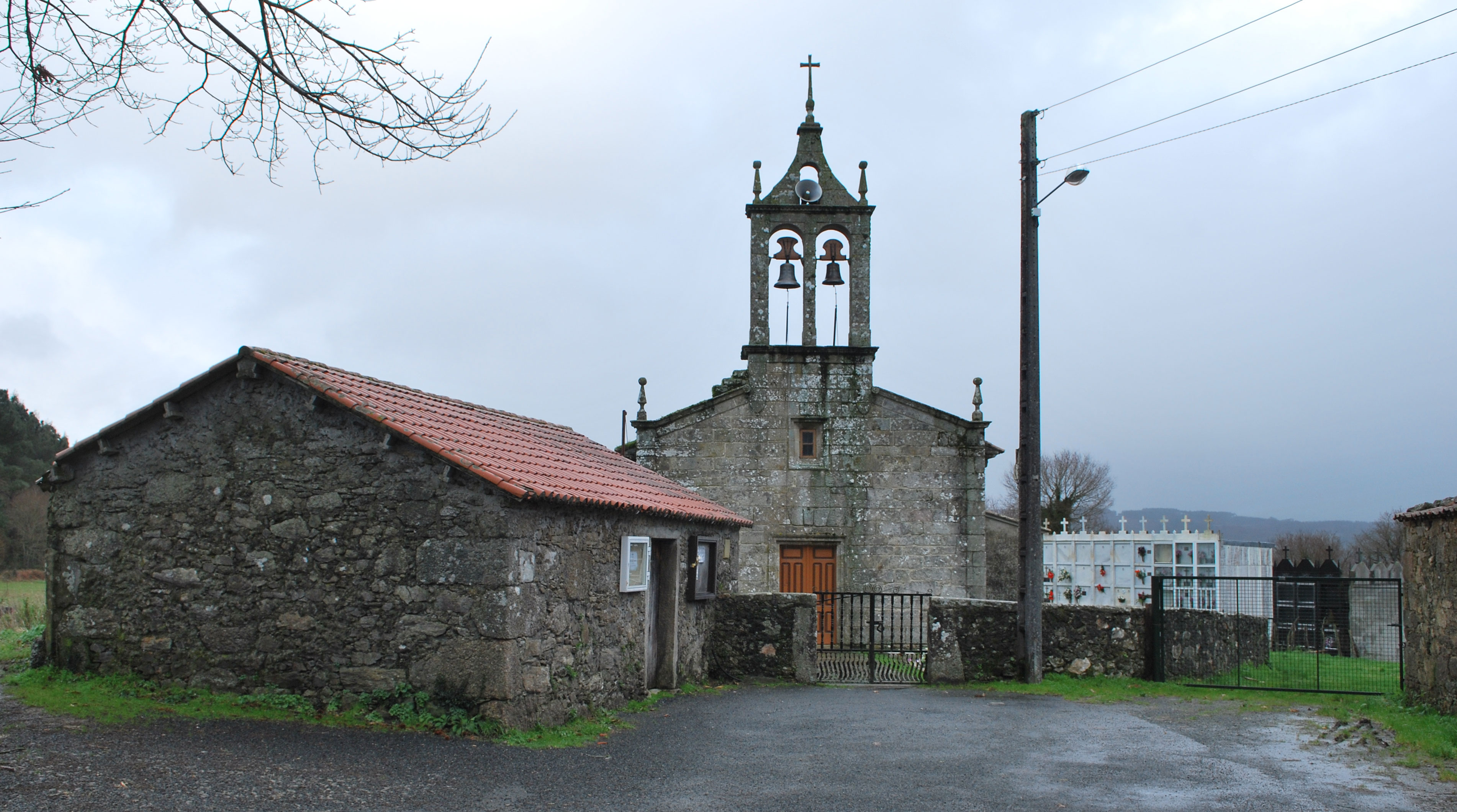 Igrexa de San Vicenzo de Curtis en Vilasantar A Coruña, Galiza Spain